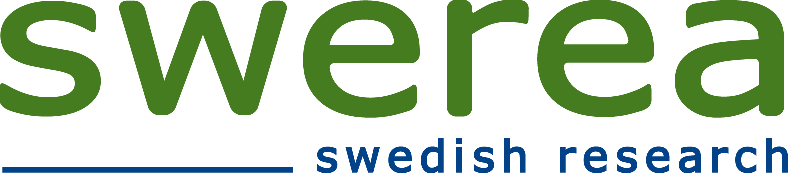 Swerea logotyp